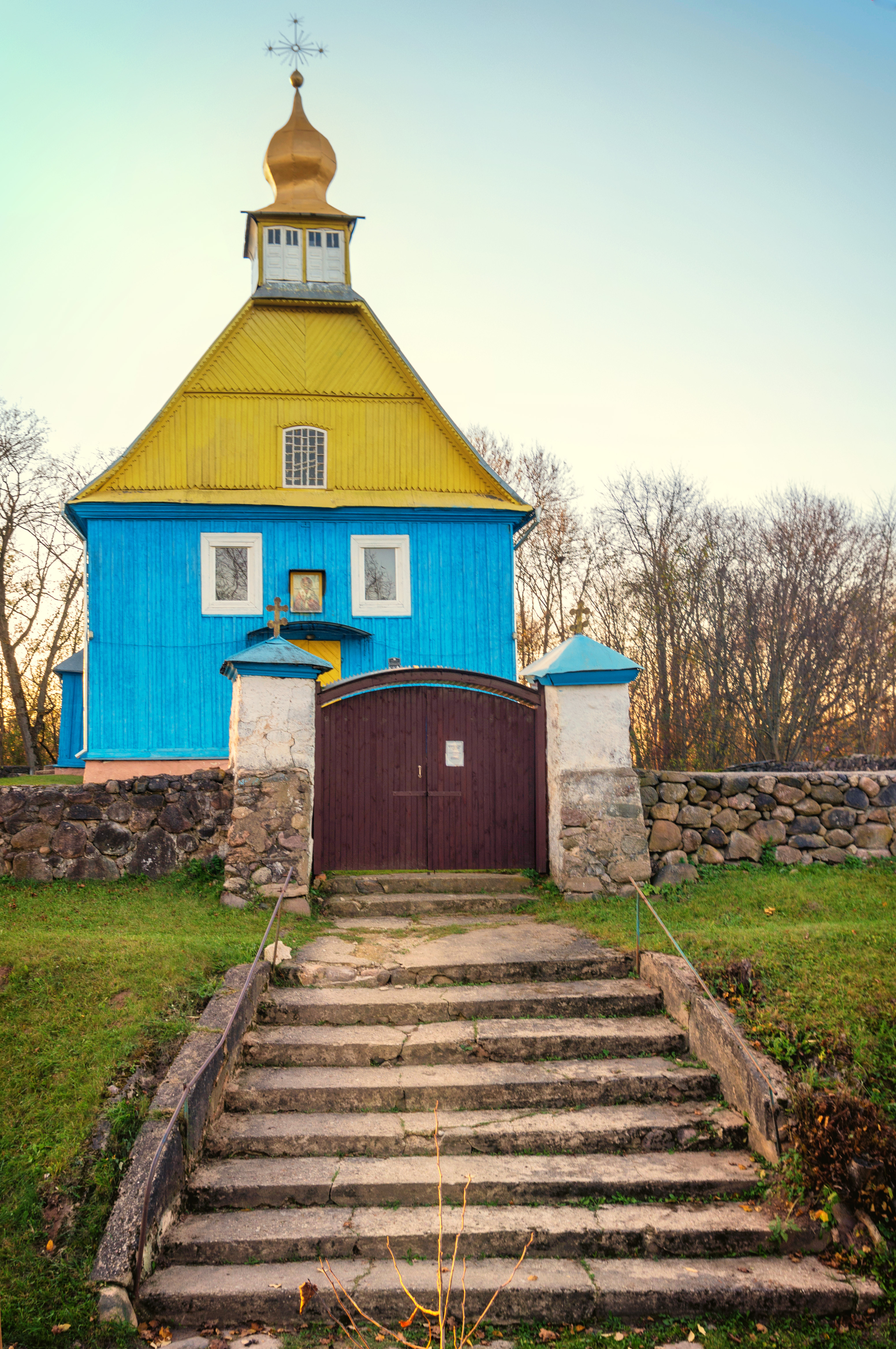 Свята-Мікалаеўская царква (Латыгаль)